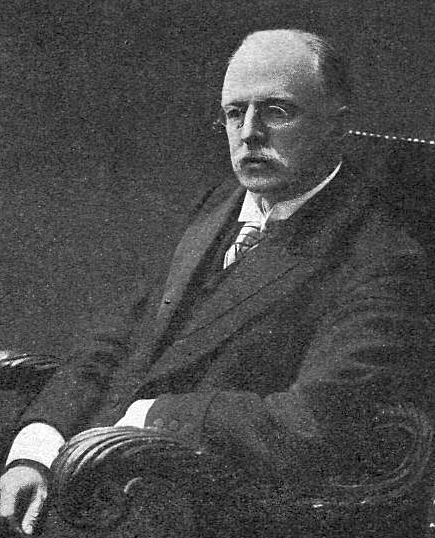 Тимашев Сергей Иванович